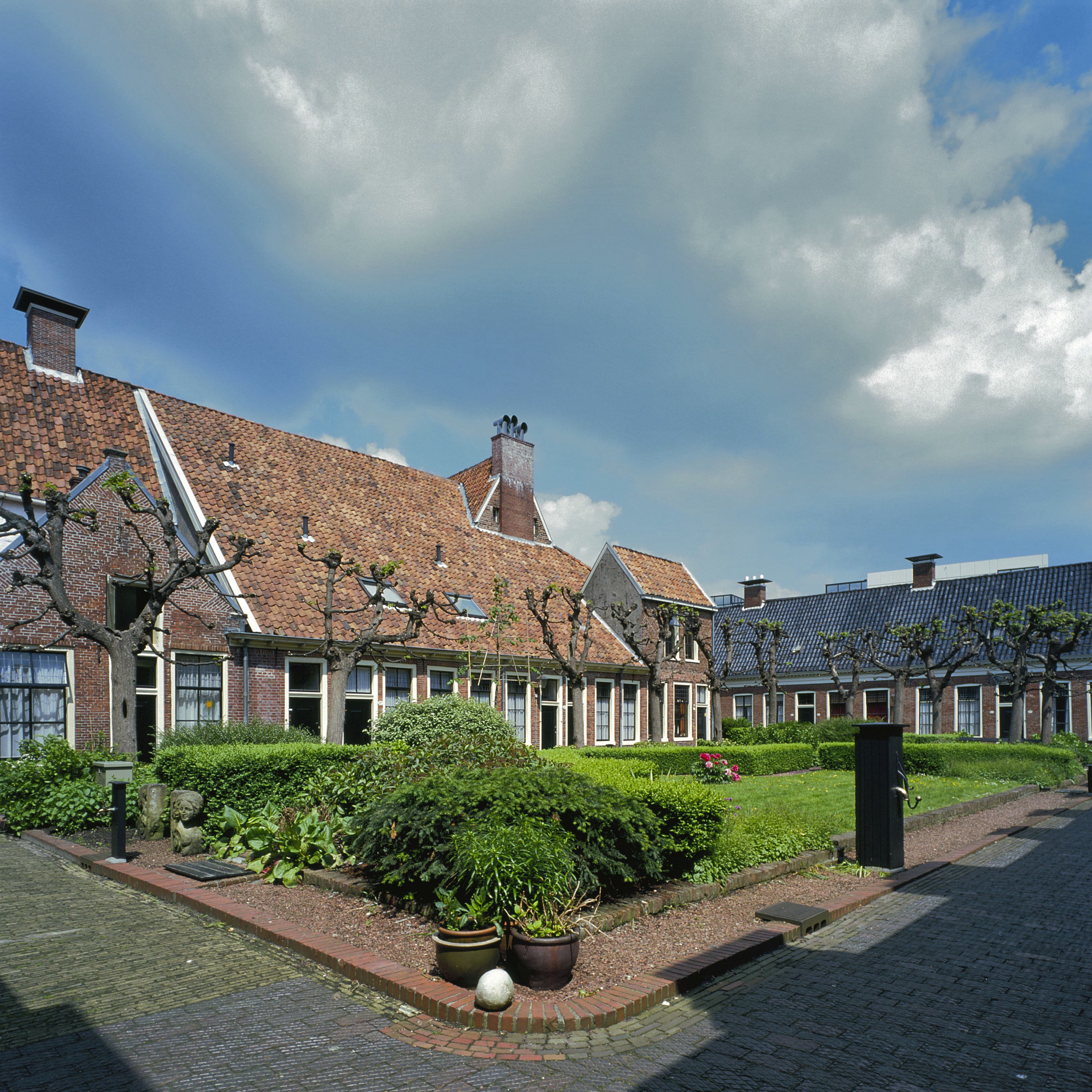 Pepergasthuis, Groningen, overzicht van één van de (twee) binnenplaatsen, 2003 (opmerking: Gefotografeerd voor ANWB Monumentenboek)